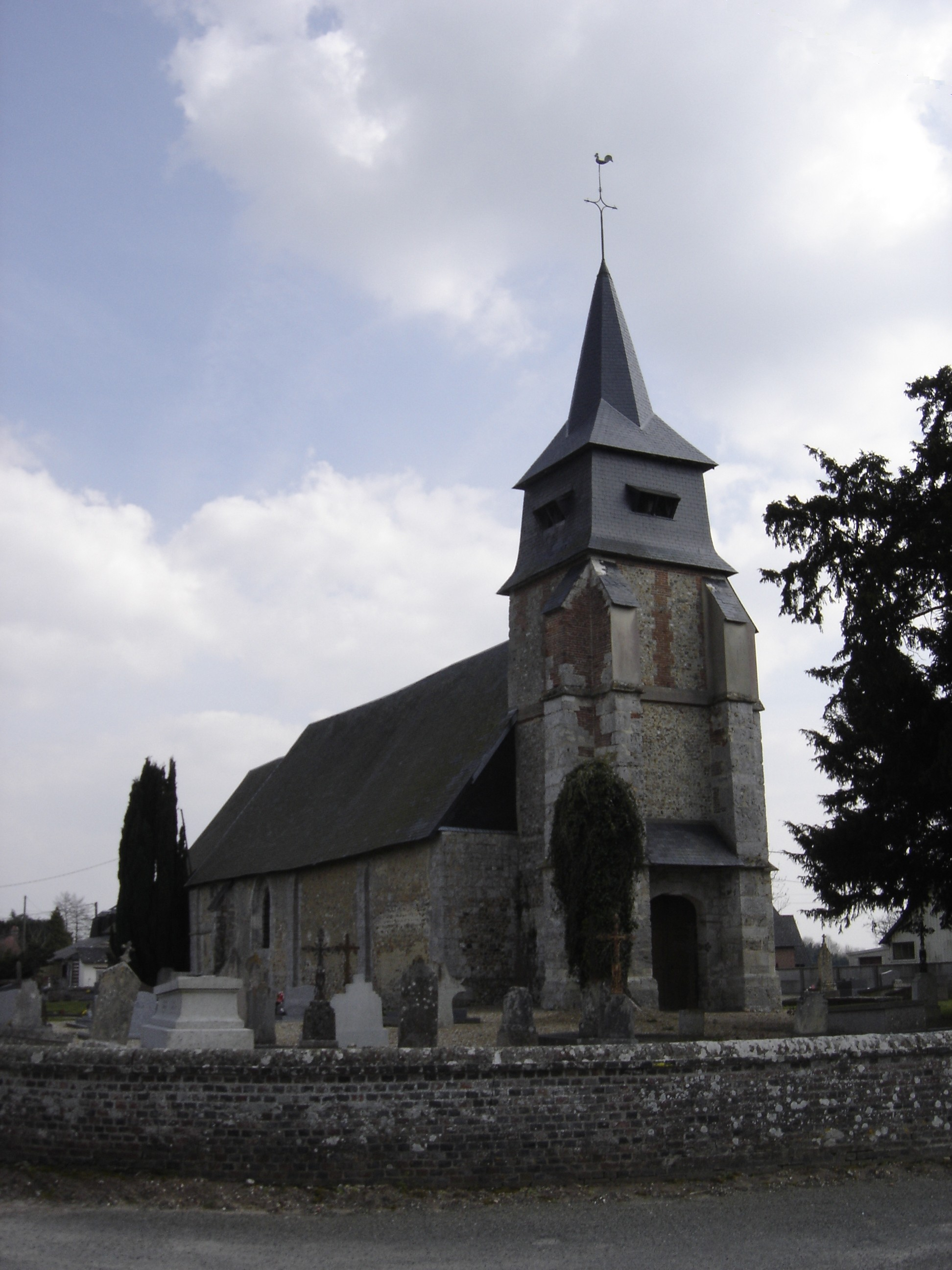 Église Saint-Denis à Vannecrocq - Eure - France (façade)